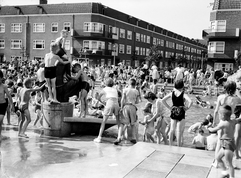 Zwemdrukte in de Solebaystraat, Amsterdam, 16 juni 1953 Foto Ben van Meerendonk / AHF, collectie IISG, Amsterdam